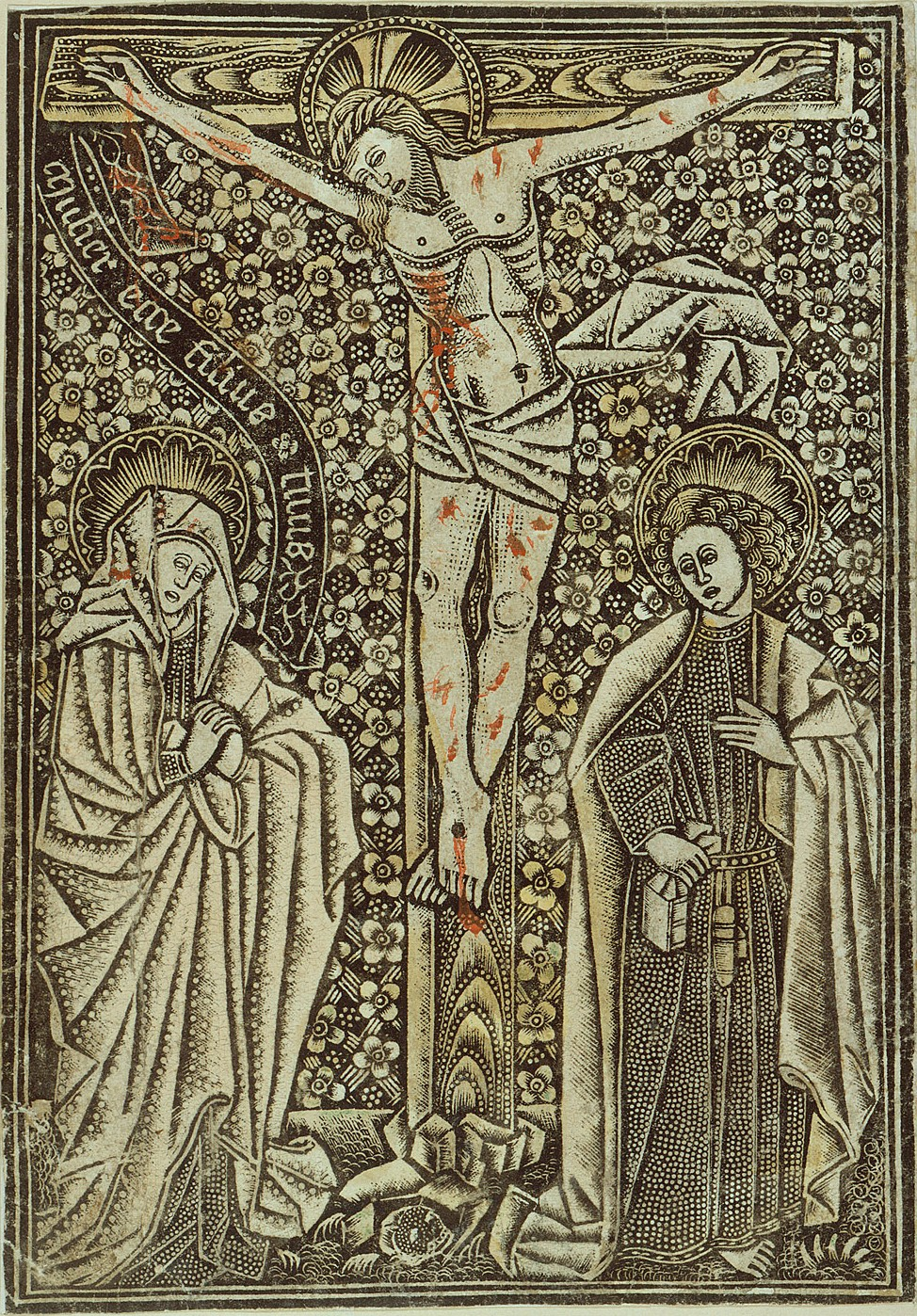 Kreuzigung. Metallschnitt